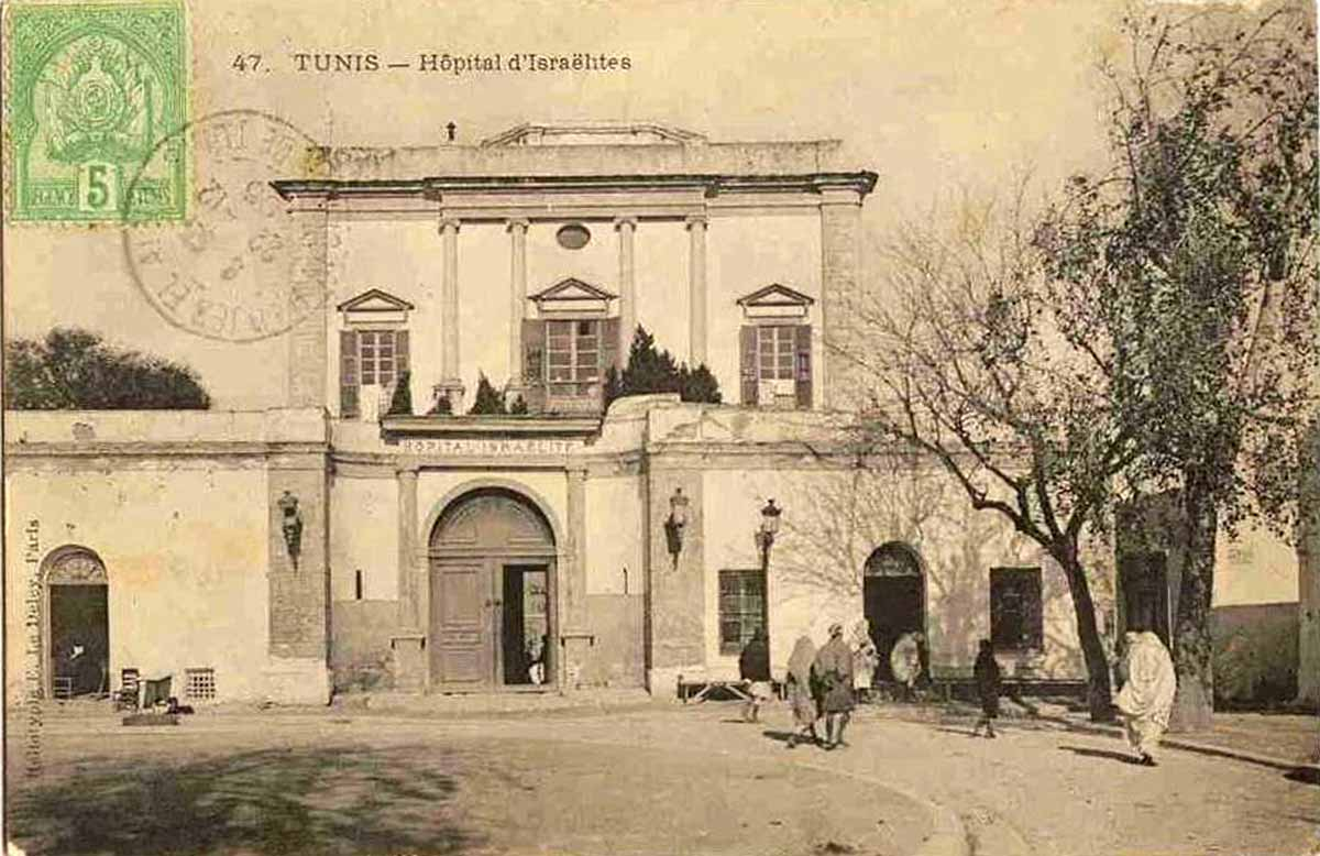 Tunis, l'hopital israélite